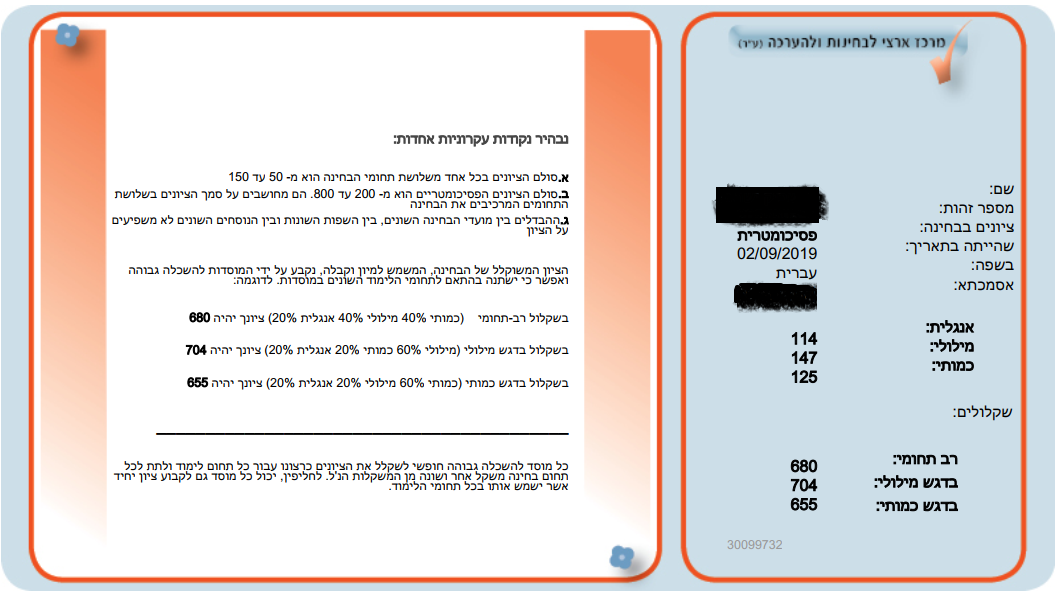 דוגמה לקובץ ציוני המבחן הפסיכומטרי